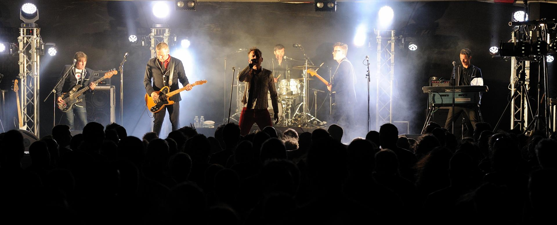 St-Jeure d'Ay singes heureux 1